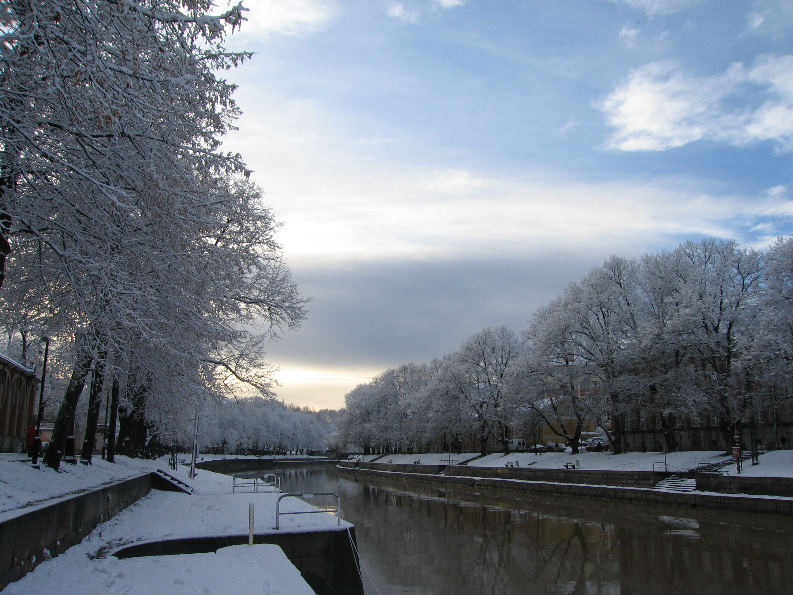 Aurajoki ja ensilumi marraskuussa 2004.